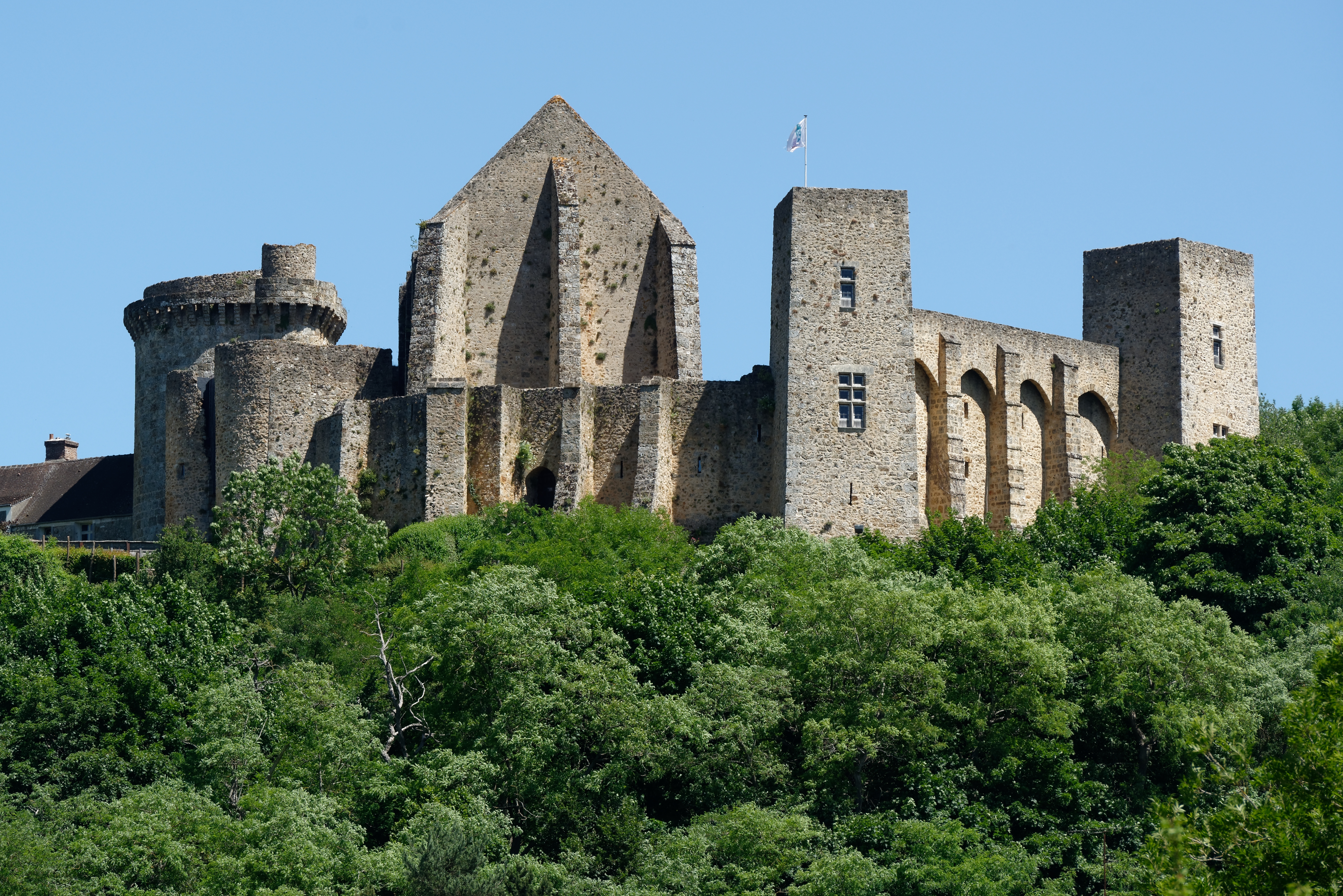 Le château de la Madeleine à Chevreuse, dans les Yvelines, vu depuis le parking de la Mare aux canards.